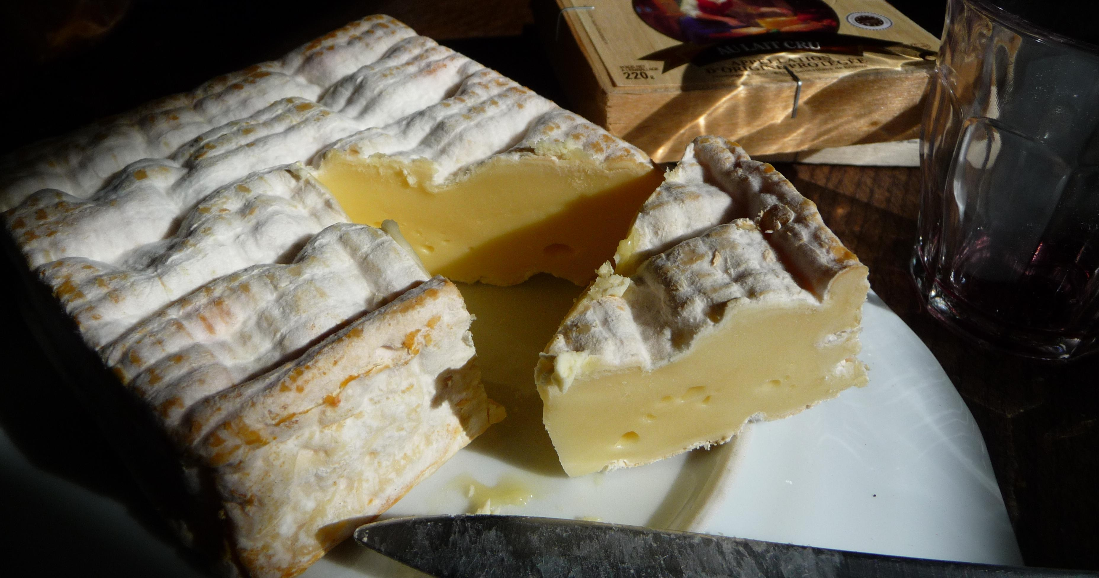 Fromage pont l'évêque (petit) séparé et présenté sur une assiette renversée. A côté, un verre de marque française DURALEX modèle "picardie". En arrière plan, l'emballage de bois du fromage.